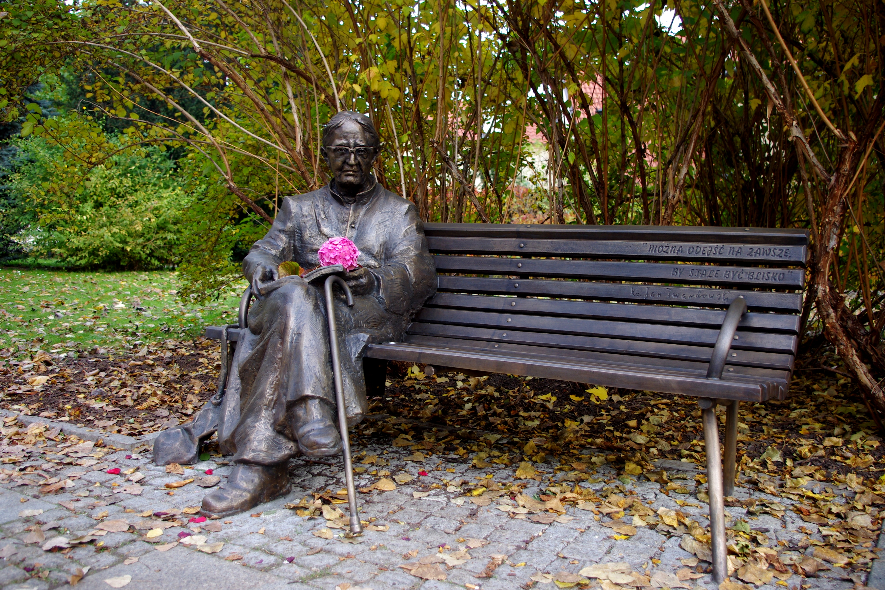 Pomnik ks. Jana Twardowskiego przy Krakowskim Przedmieściu w Warszawie